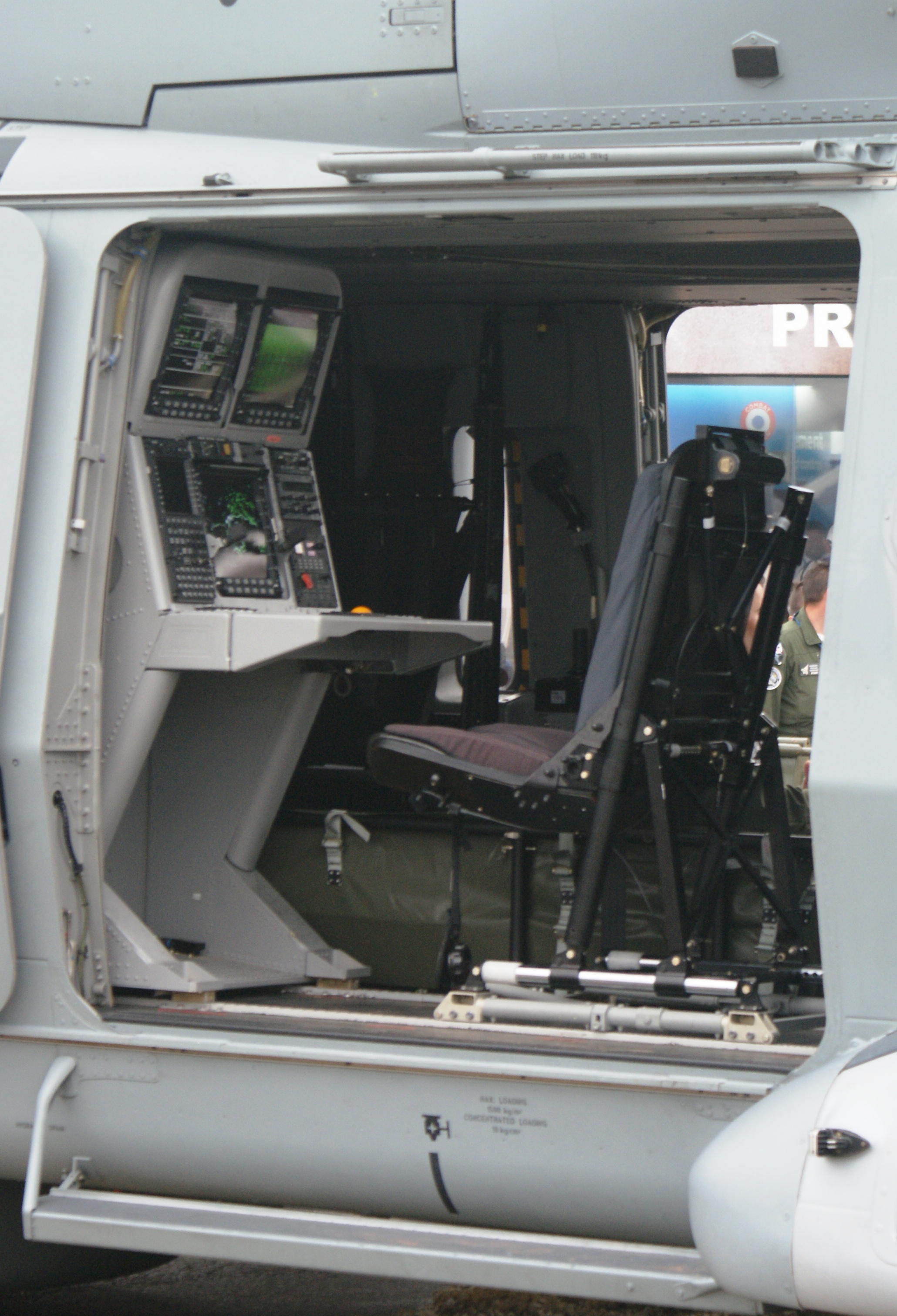 Poste tactique utilisé par le chef de bord pour la recherche et l'attaque de bâtiments de surface ou de sous-marins